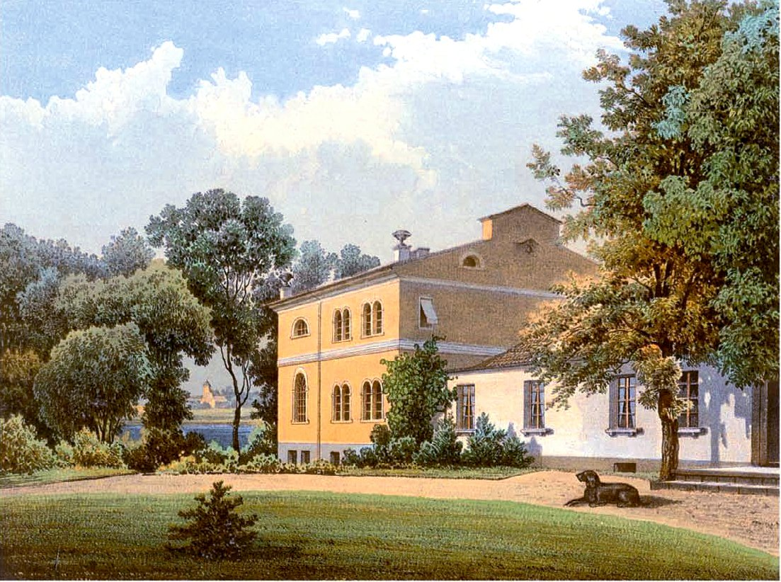 Rittergut Seehof, Kreis Schlawe